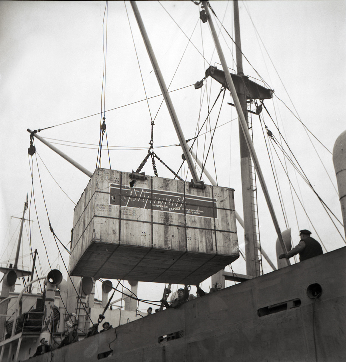 ANA:s Automobilfabrik, last från Amerika 1948